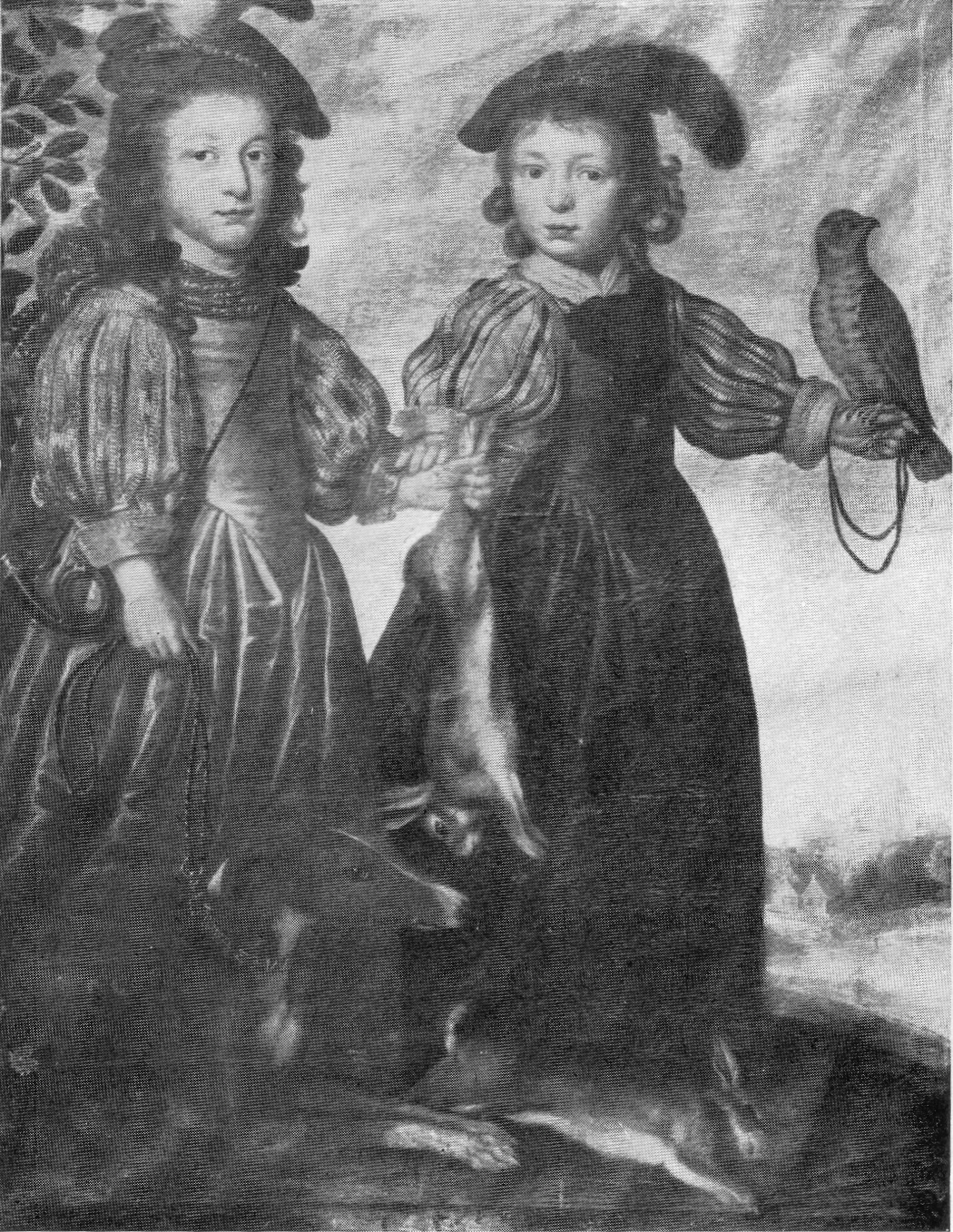 Wilhelm Wirich und sein Bruder Emich